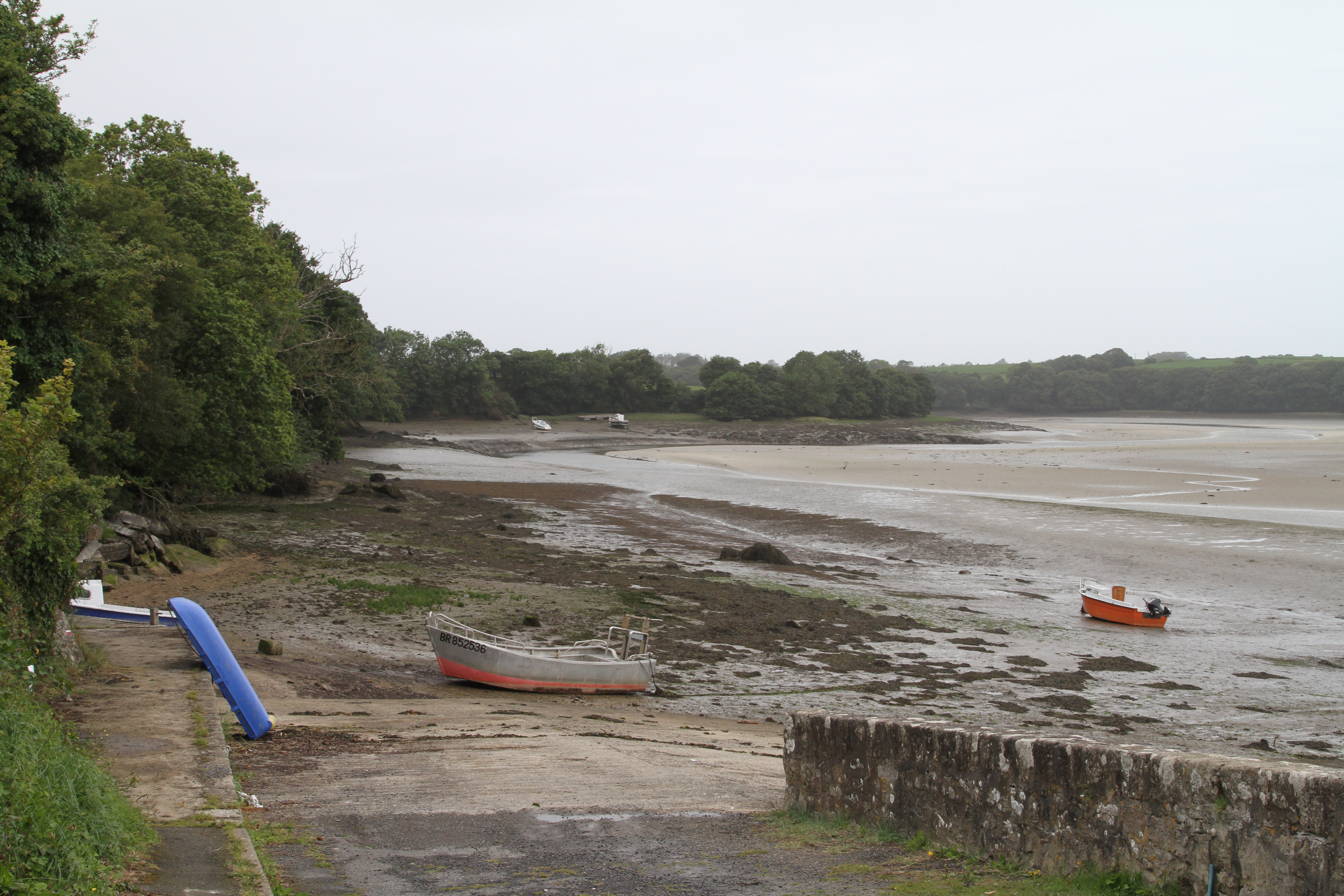 Cale à l'Aber Benoit sur la commune Tréglonou